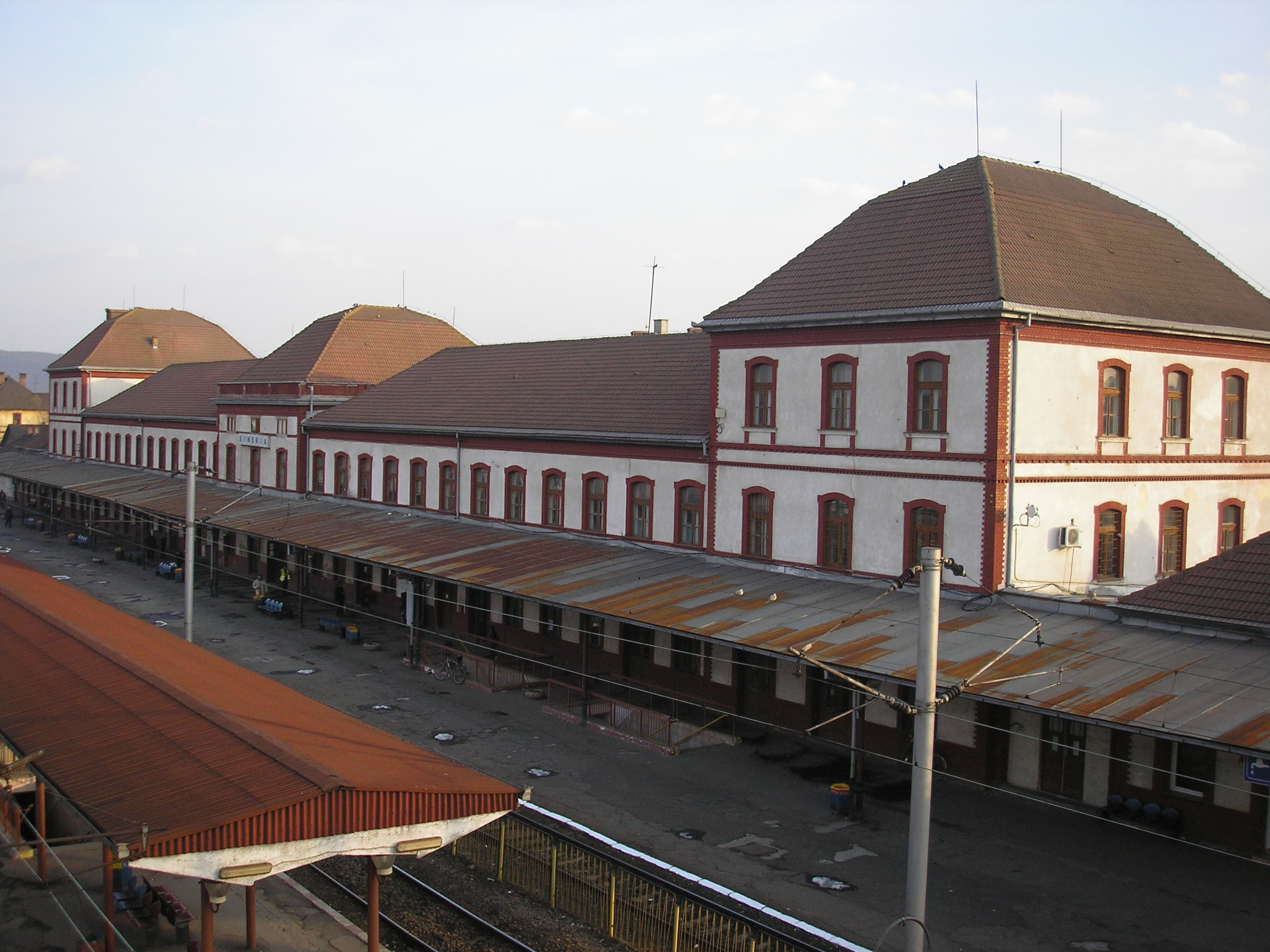 Gara Simeria / Simeria train station